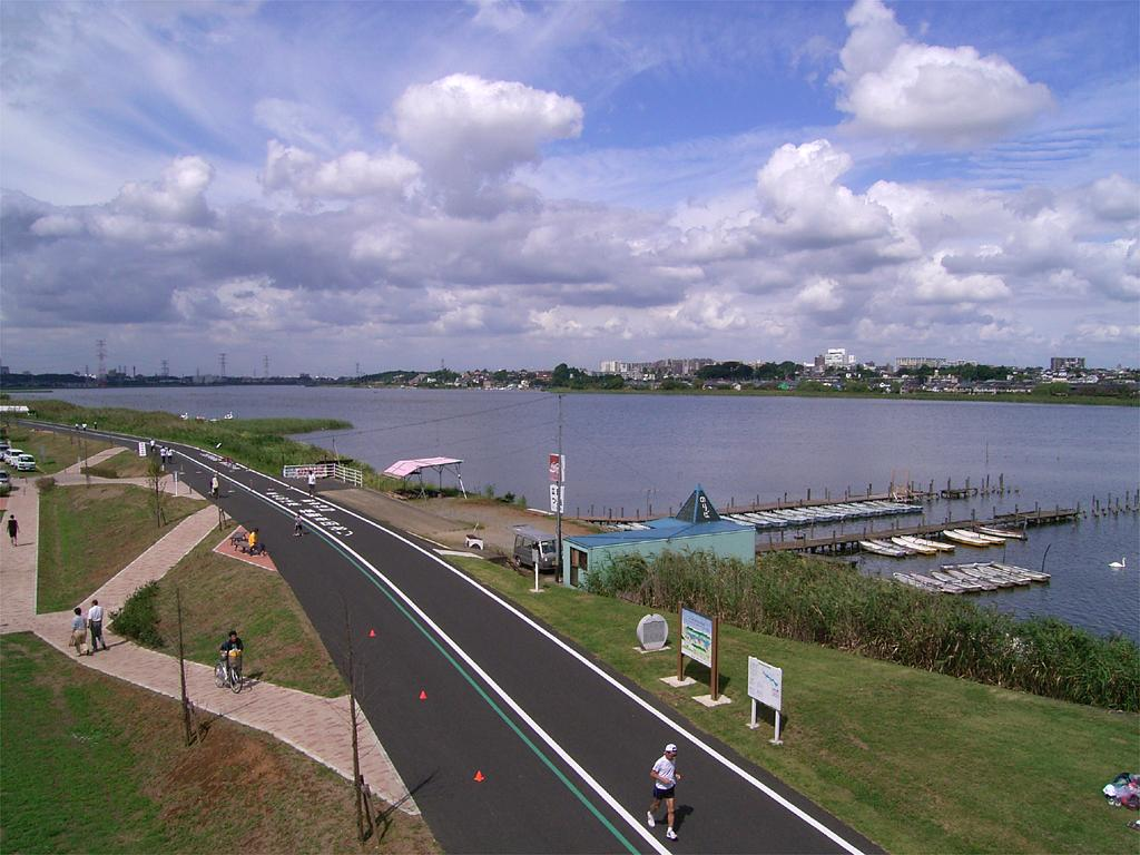 Tega marsh